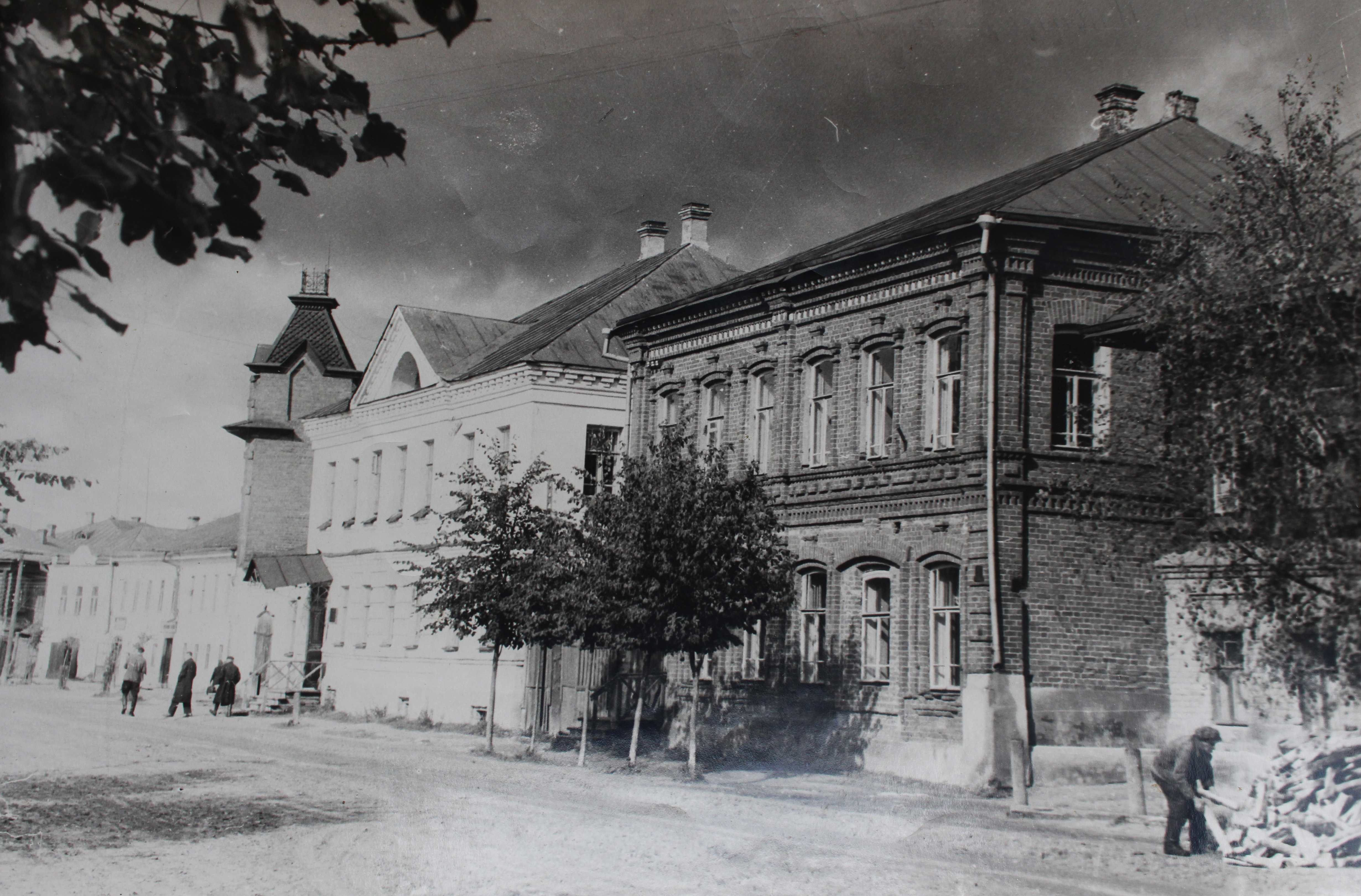 Кирпичные здания в центре города